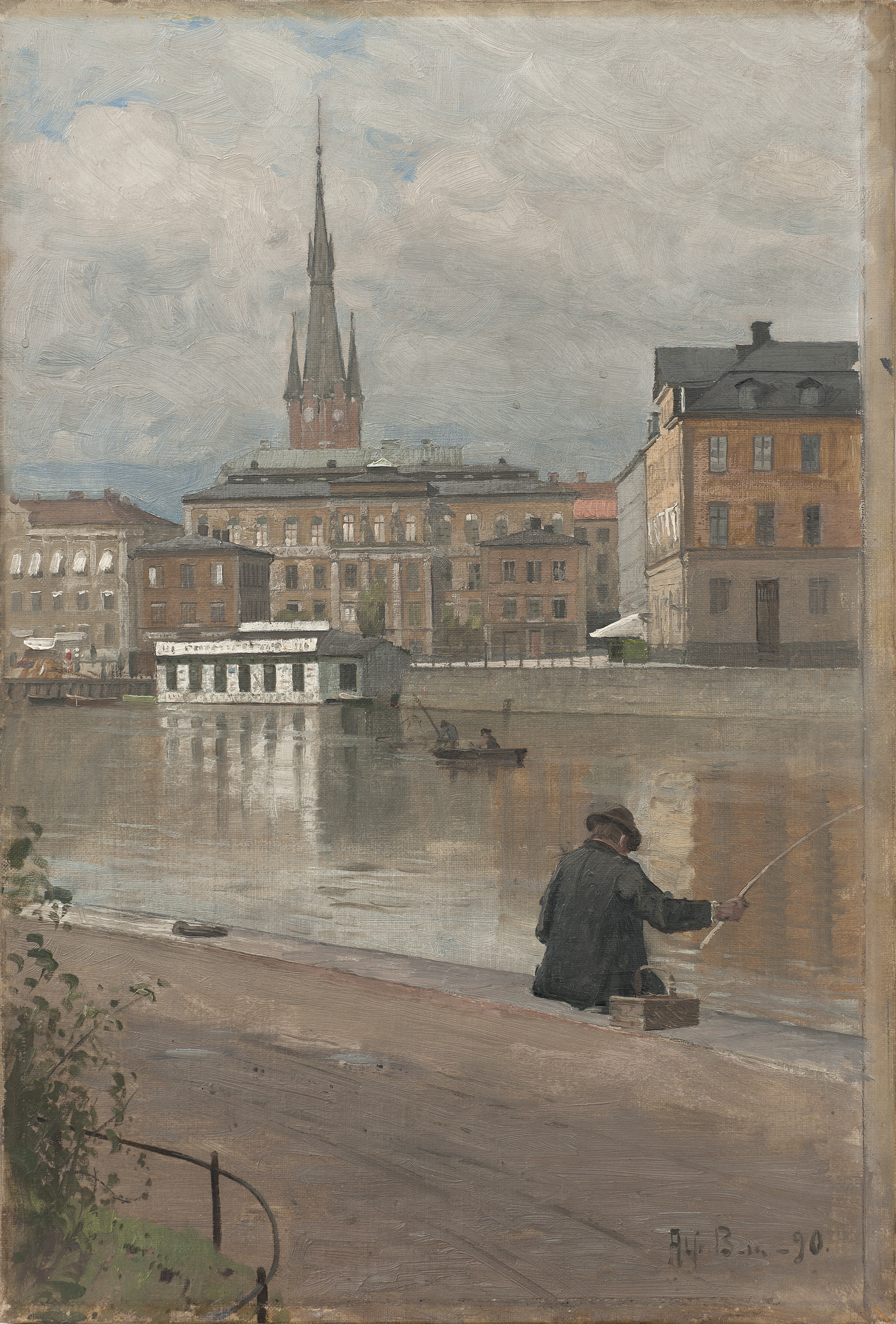 View of Konstakademien in Stockholm, 1890.